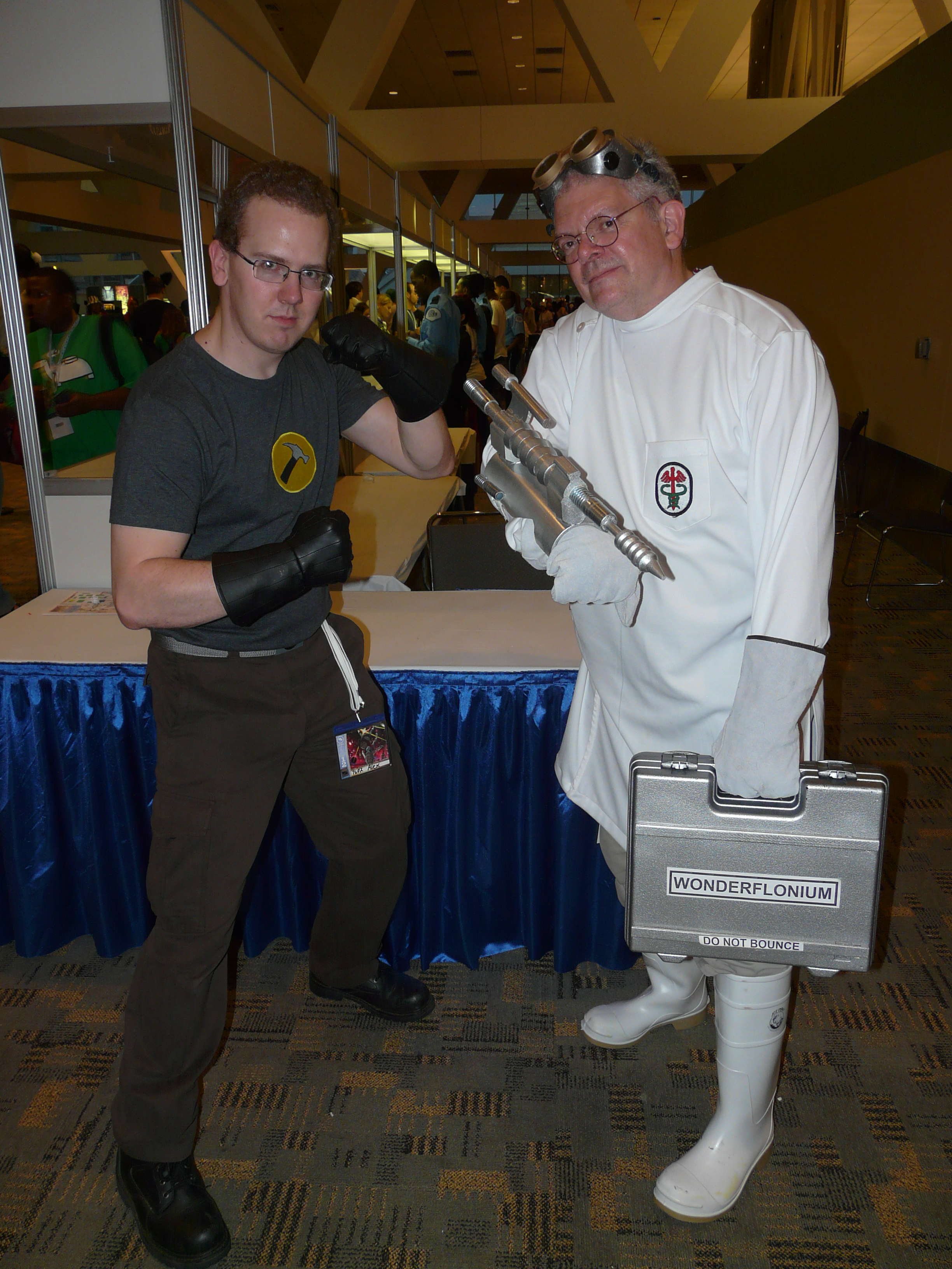 Otakon 2012 cosplay